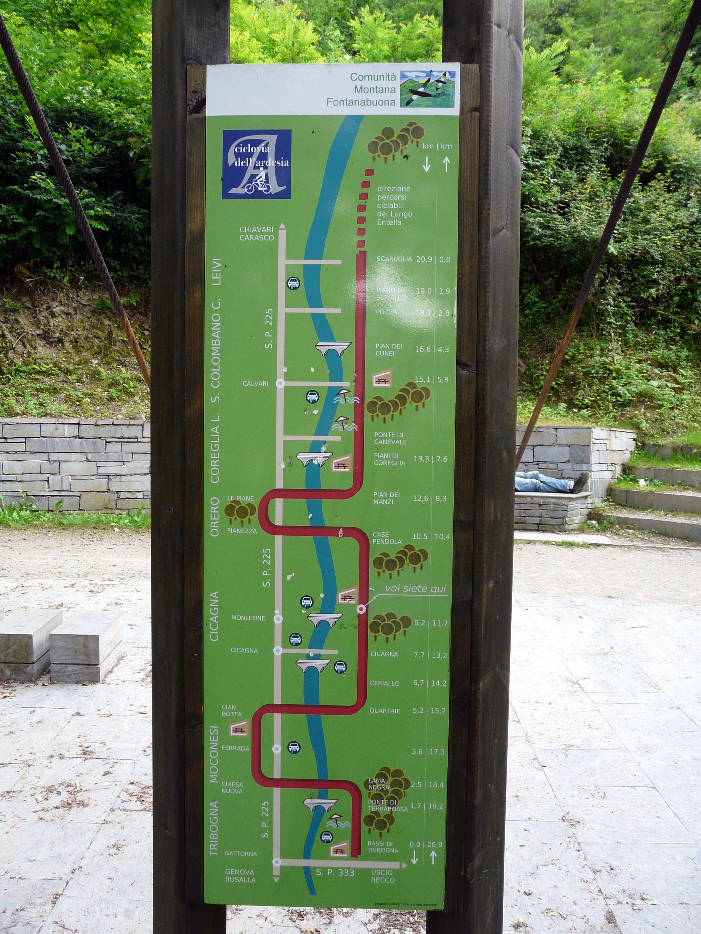 Cartello e mappa della pista ciclabile, Cicagna, Liguria, Italia